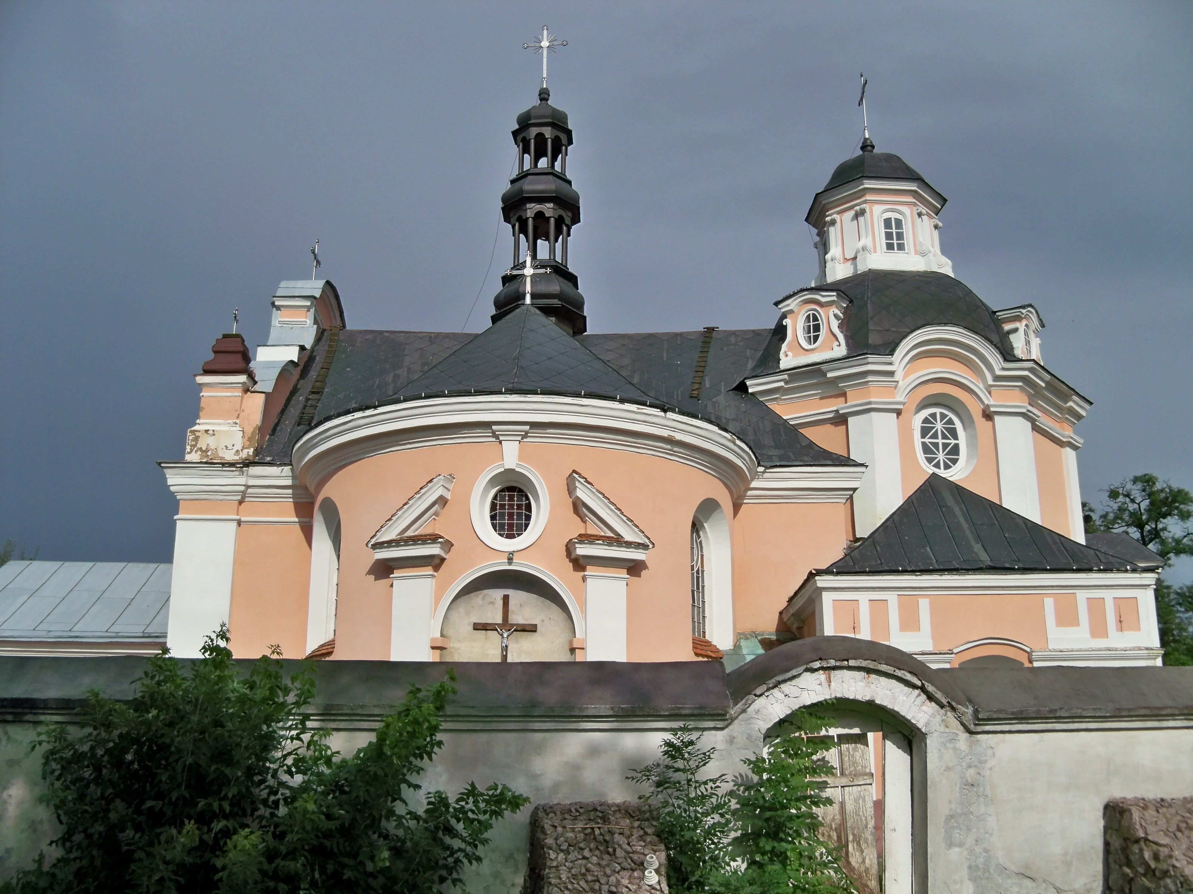 Костел Св.Антонія (мур.), Корець, вул.Костельна